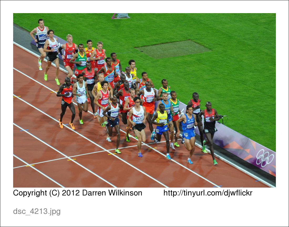 10k race